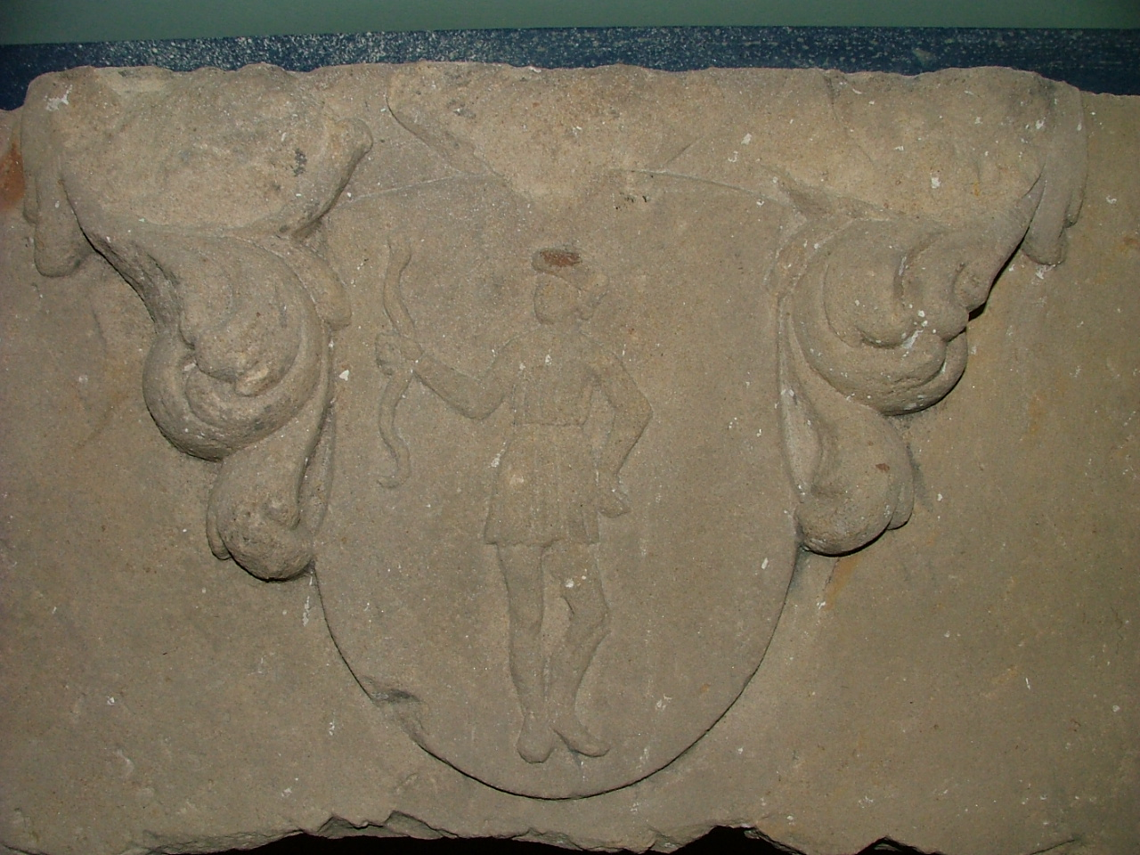 Przechowywany w Muzeum Ziemi Szprotawskiej